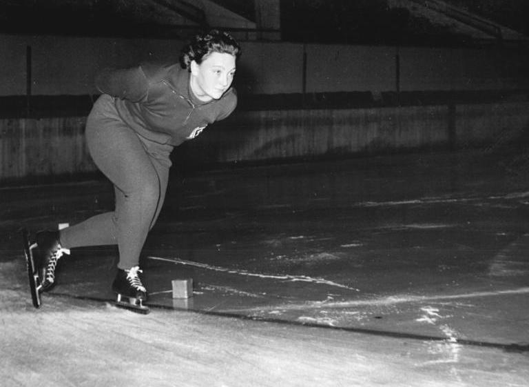 Inge Görmer Zentralbild Funck-28.9.1955 Wjt-Qu- Zur Auszeichnung mit dem Titel "Meister des Sports" am 1.10.1955 vorgeschlagen: Inge Görmer, Berlin, SC Einheit, Sektion Eisschnellauf, beim Training in der "Werner-Seelenbinder-Halle" Berlin. Achtung Redaktionen! Zur Veröffentlichung frei nach offizieller Auszeichnung. Abgebildete Personen: Görmer, Inge: Eisschnelläuferin, Olympiateilnehmerin 1960, DDR